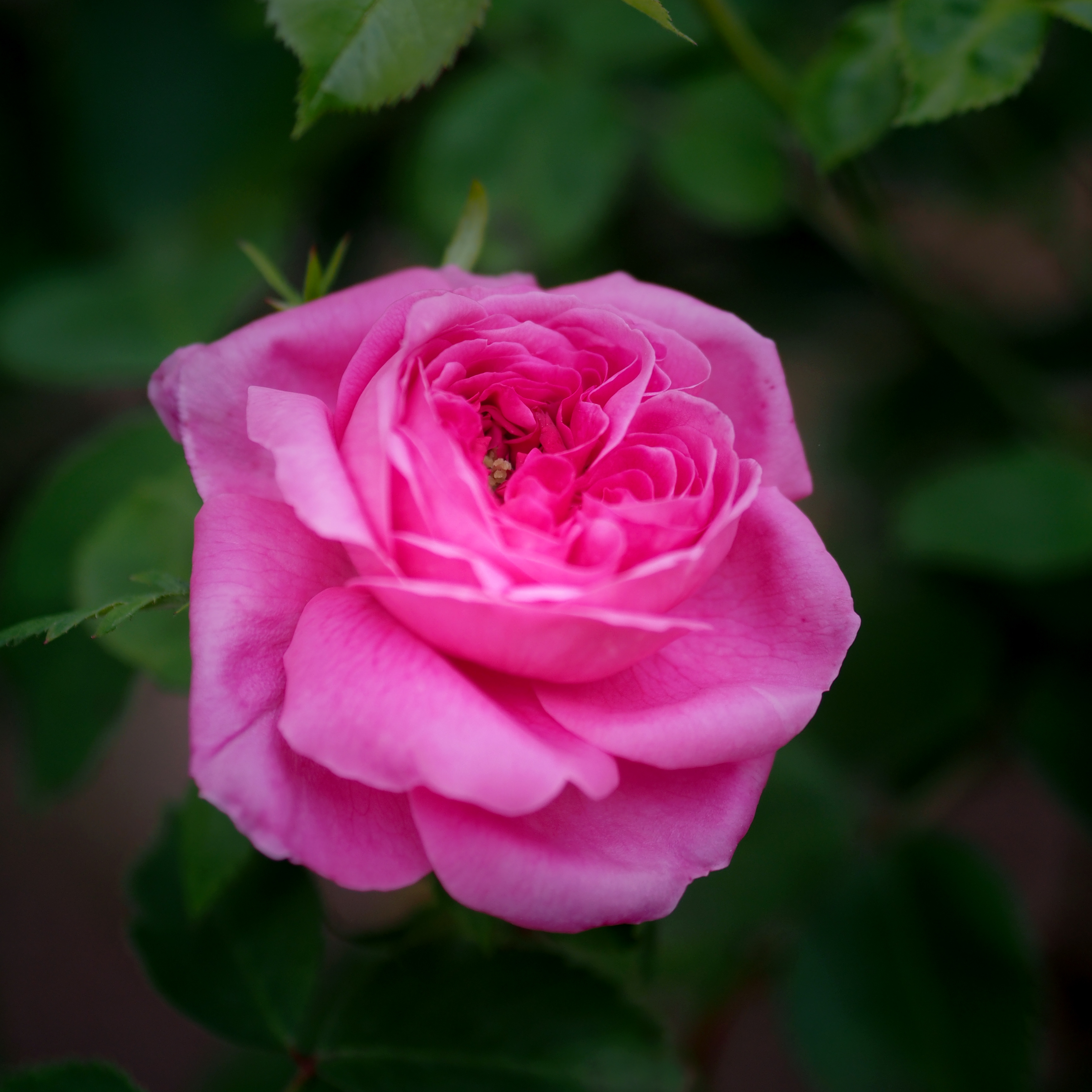 Rose, Jules Margottin, バラ, ジュール マルゴッタン, Old rose(HP) オールドローズ France フランス Margottin 1853